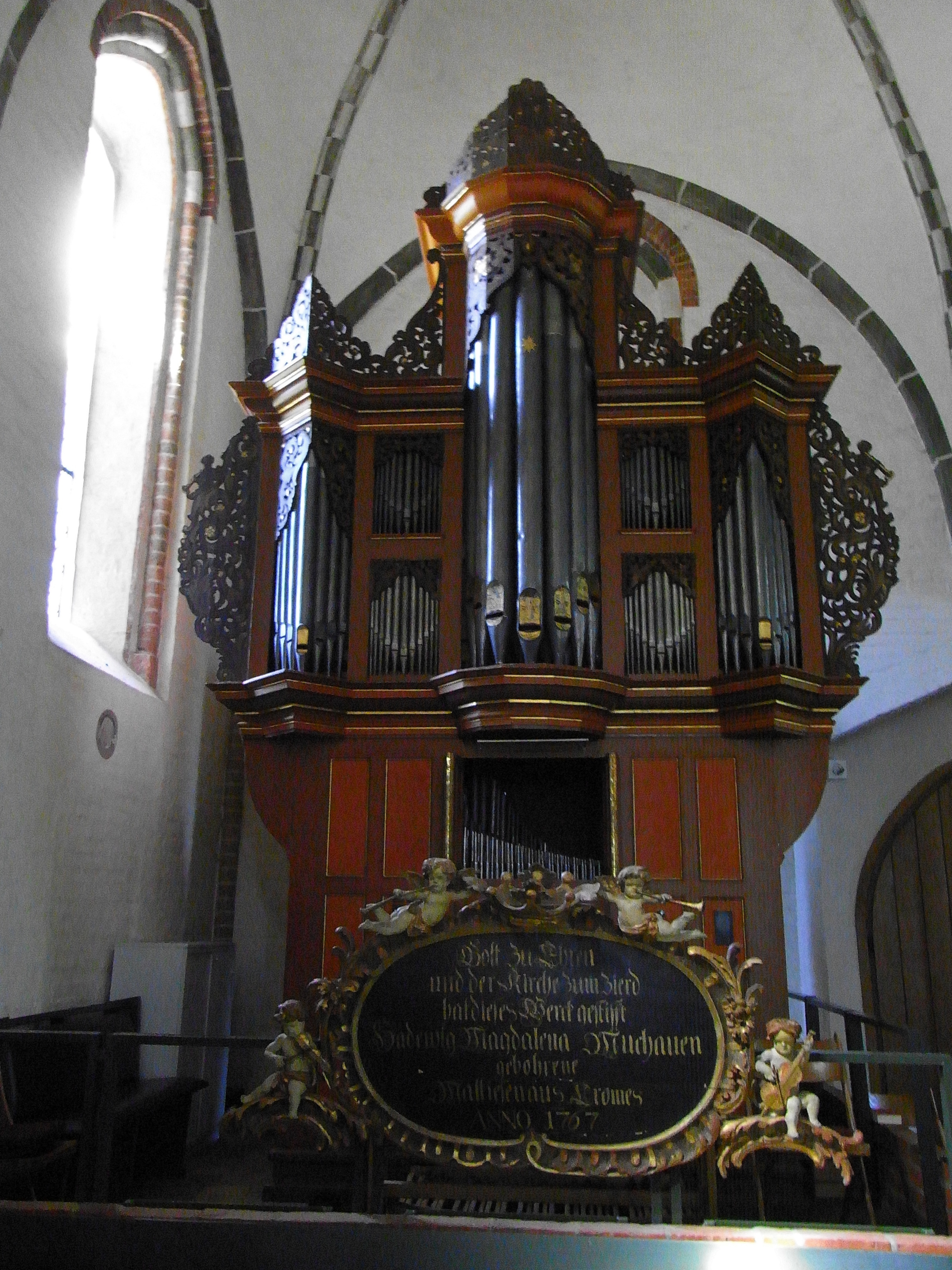 Orgel in Krummesse, Schleswig-Holstein